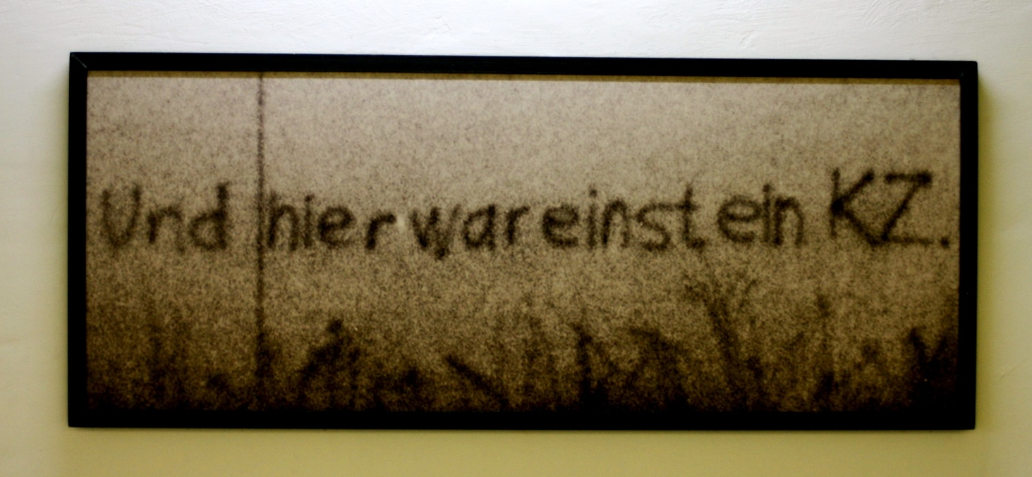 Foto in der Ausstellung zum KZ Neuengamme